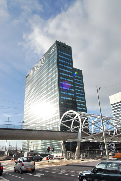 Hoofdkantoor van TNT Post aan de rechterkant van de Utrechtsebaan (A12 Utrecht-Den Haag).